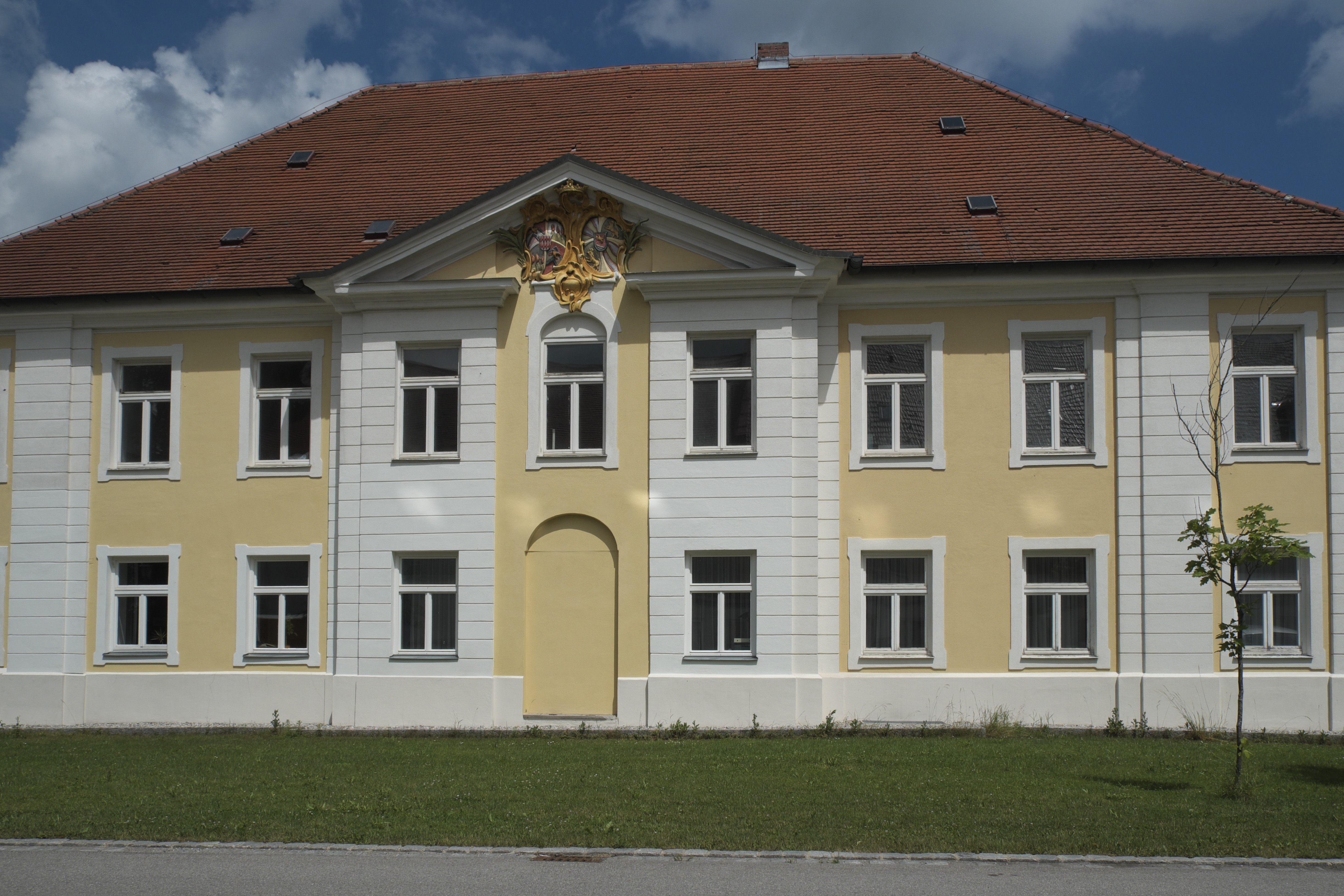 Schloss Spielberg, ehemalige Burg Spielberg in Oberschweinbach im Landkreis Fürstenfeldbruck (Bayern/Deutschland)